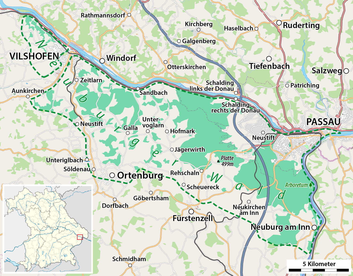 Lagekarte Neuburger Wald